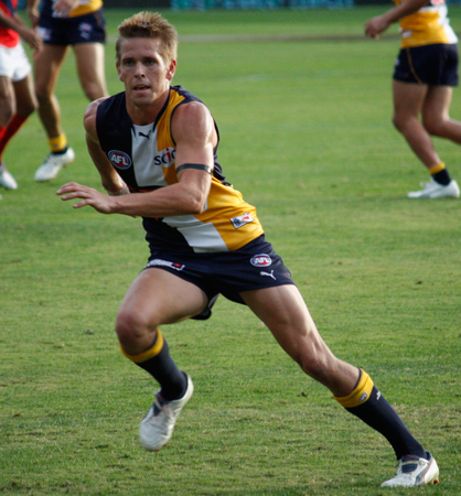 Mark LeCras